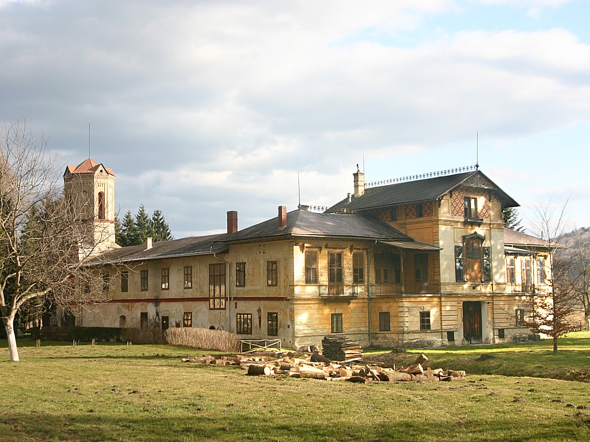 Schloss Linsberg in Erlach (Niederösterreich) Wirtschaftsgebäude